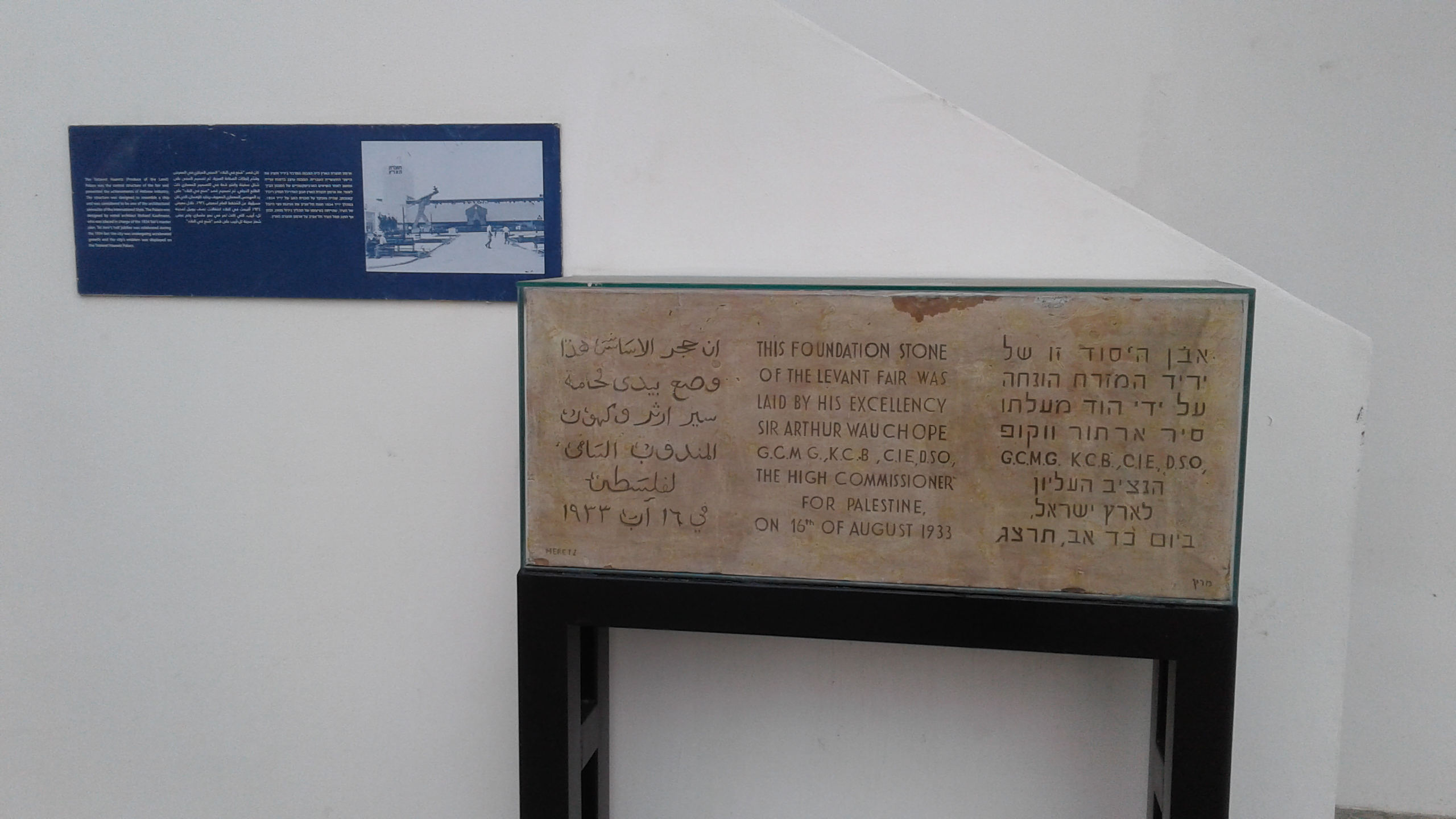 אבן היסוד של יריד המזרח אותה הניח סיר ארתור ווקופ בשנת ה'תרצ"ג, מוצגת בנמל תל אביב